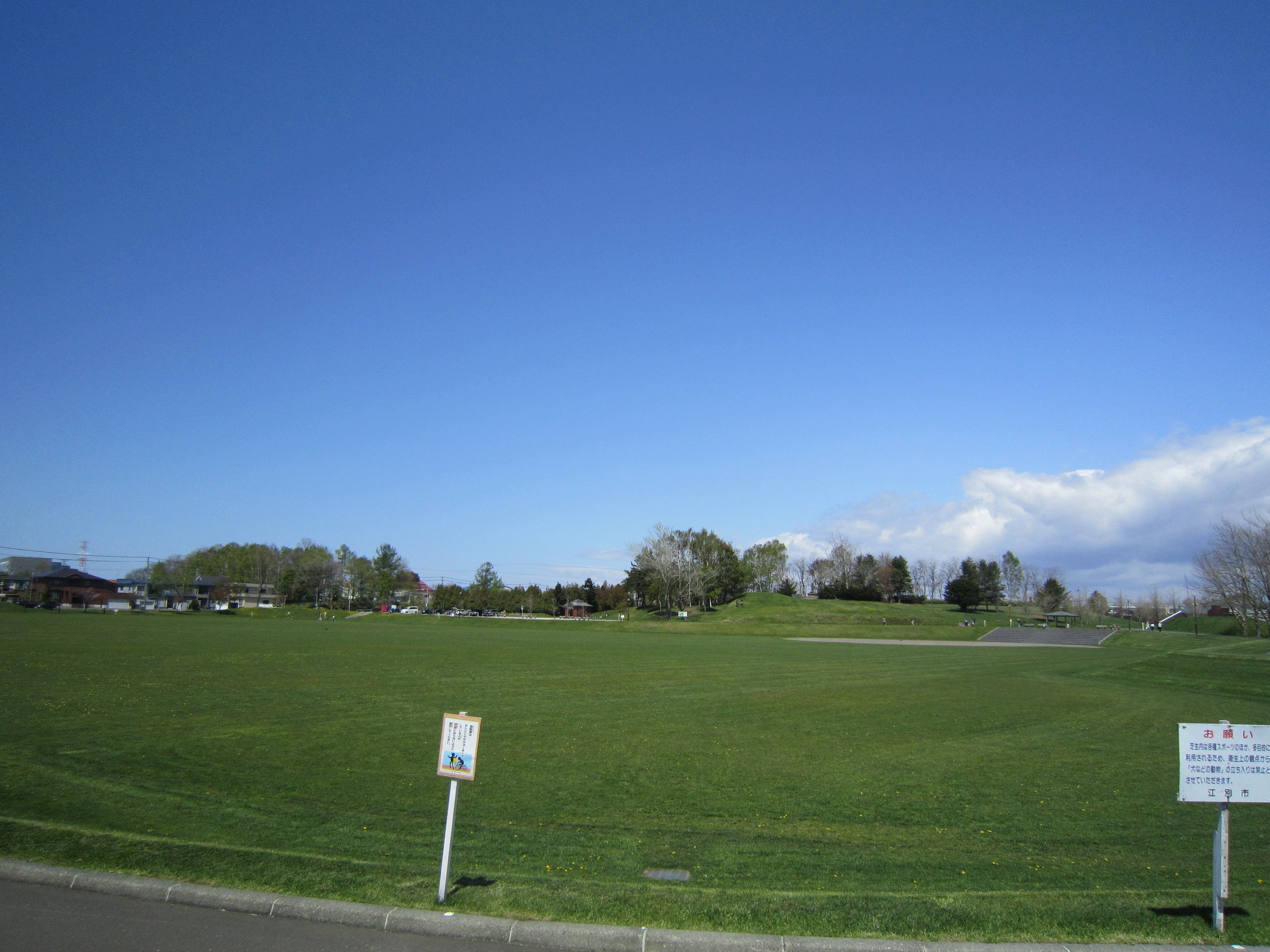 飛鳥山公園。江別市